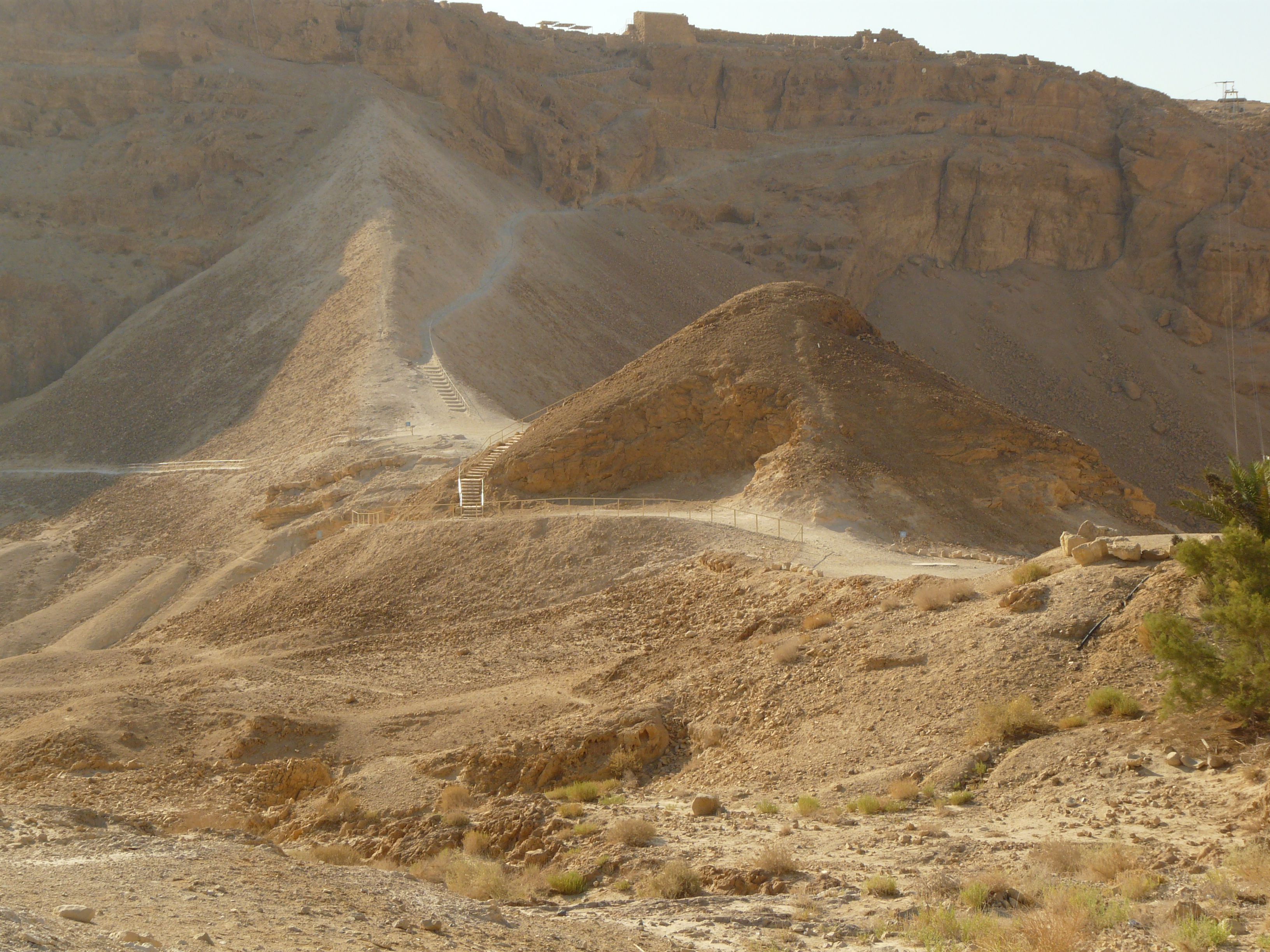 Masada, Roman rampart